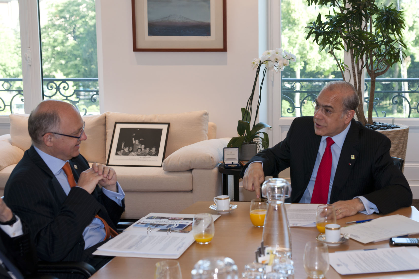 París, Francia. El Canciller Héctor Timerman se reunió en París con el Secretario General de OCDE, Angel Gurría, en el marco de los festejos por el 25 de Mayo en ese país